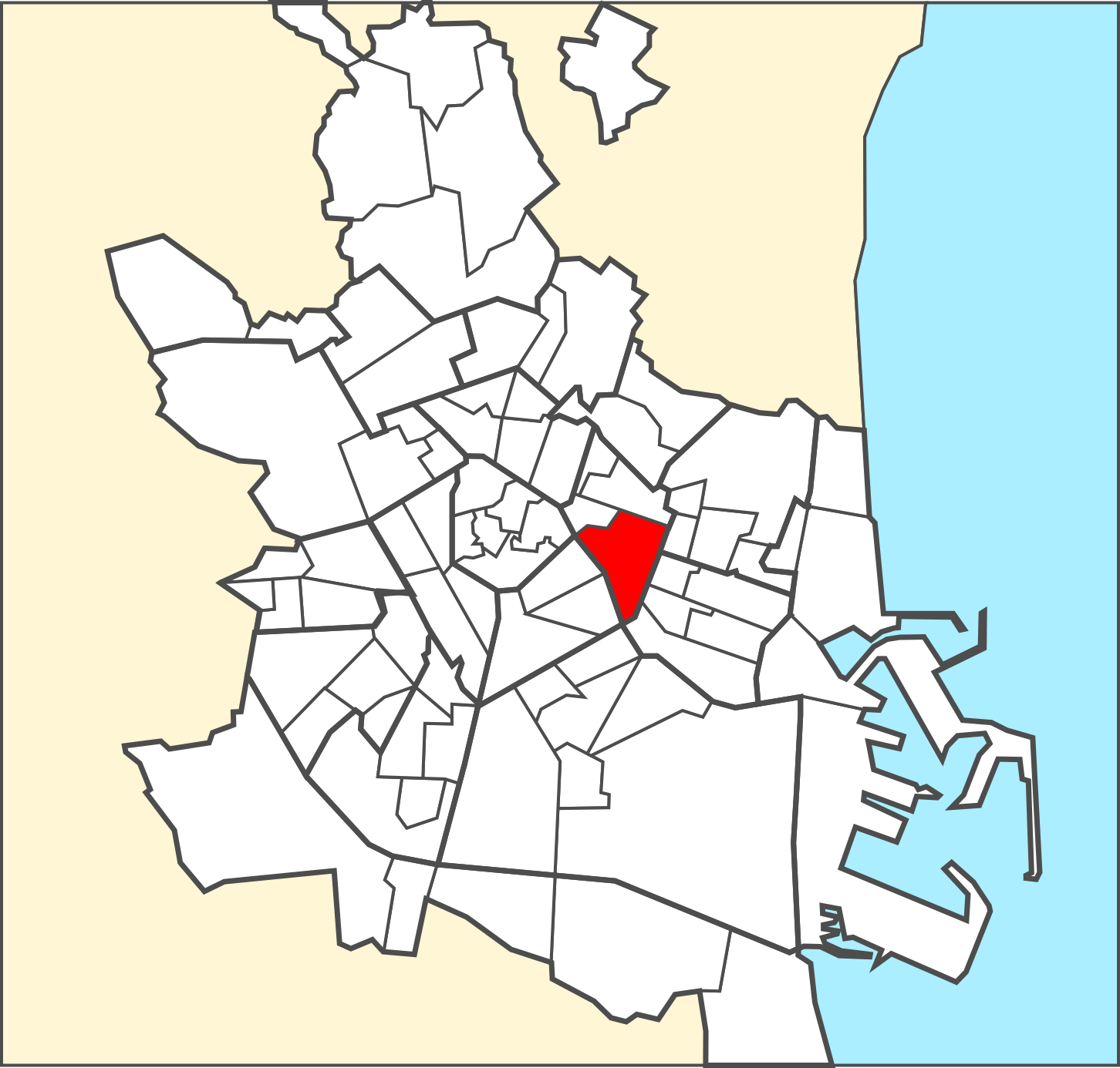 Localització del barri dins de la ciutat de València.